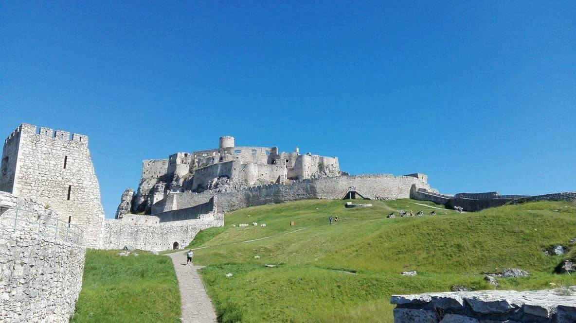 Spišský hrad, Pohľad na hrad